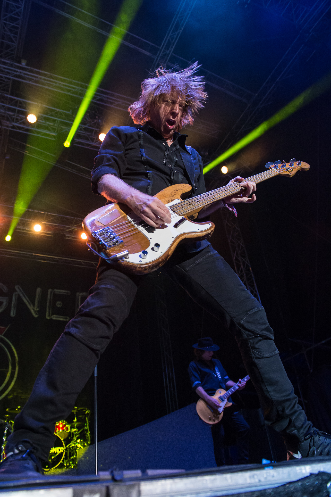 Brombachsee,Concertbüro Franken,Festival,Foreigner,Jeff Pilson,Konzert,Lieder am See,Livekonzert,Livemusik,Musik